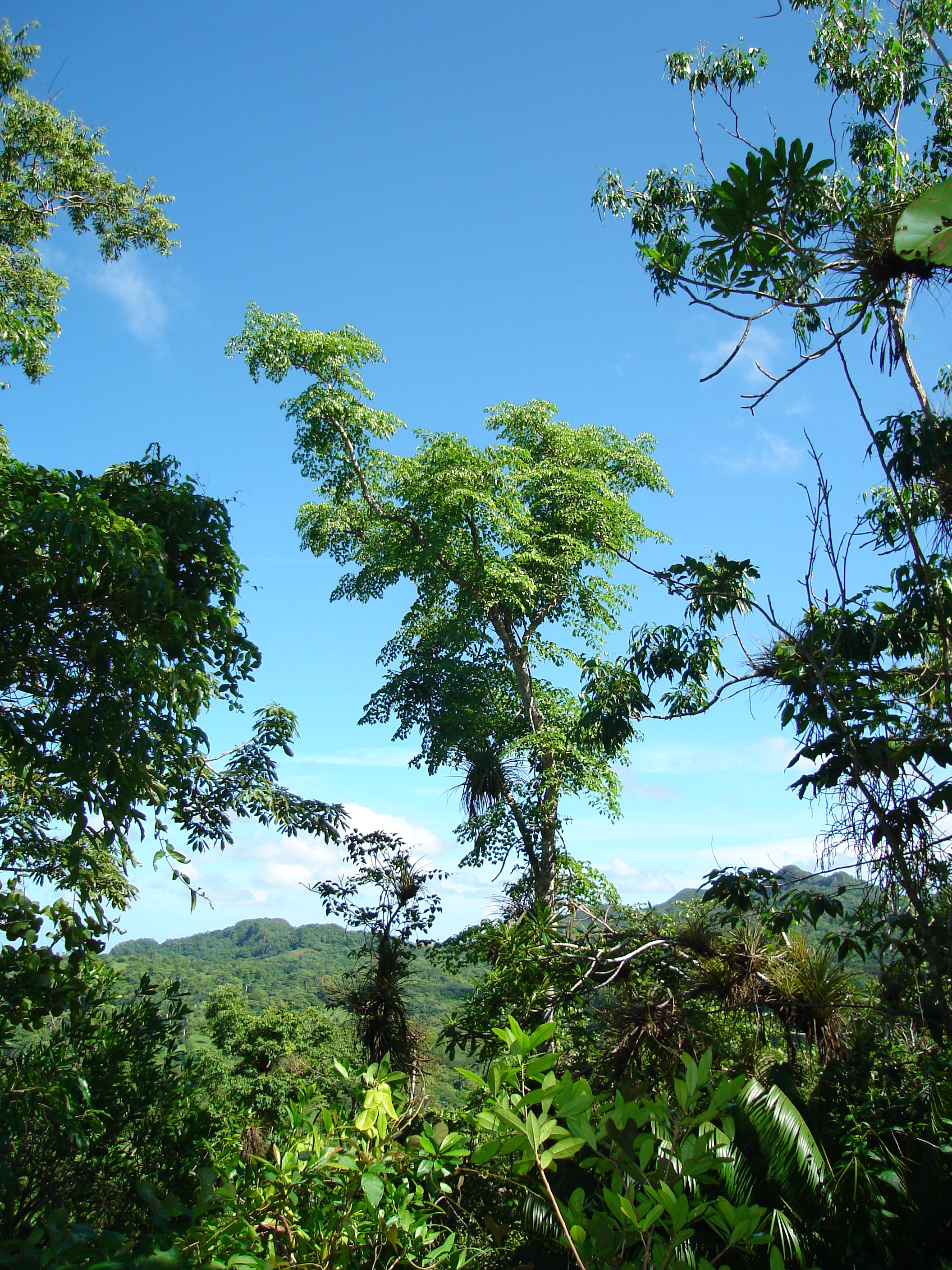 Aralia rex en Sierra de la Caoba, Parque Nacional Viñales, Pinar del Río, Cuba. Tomada en julio de 2007 por Ramiro Chaves.